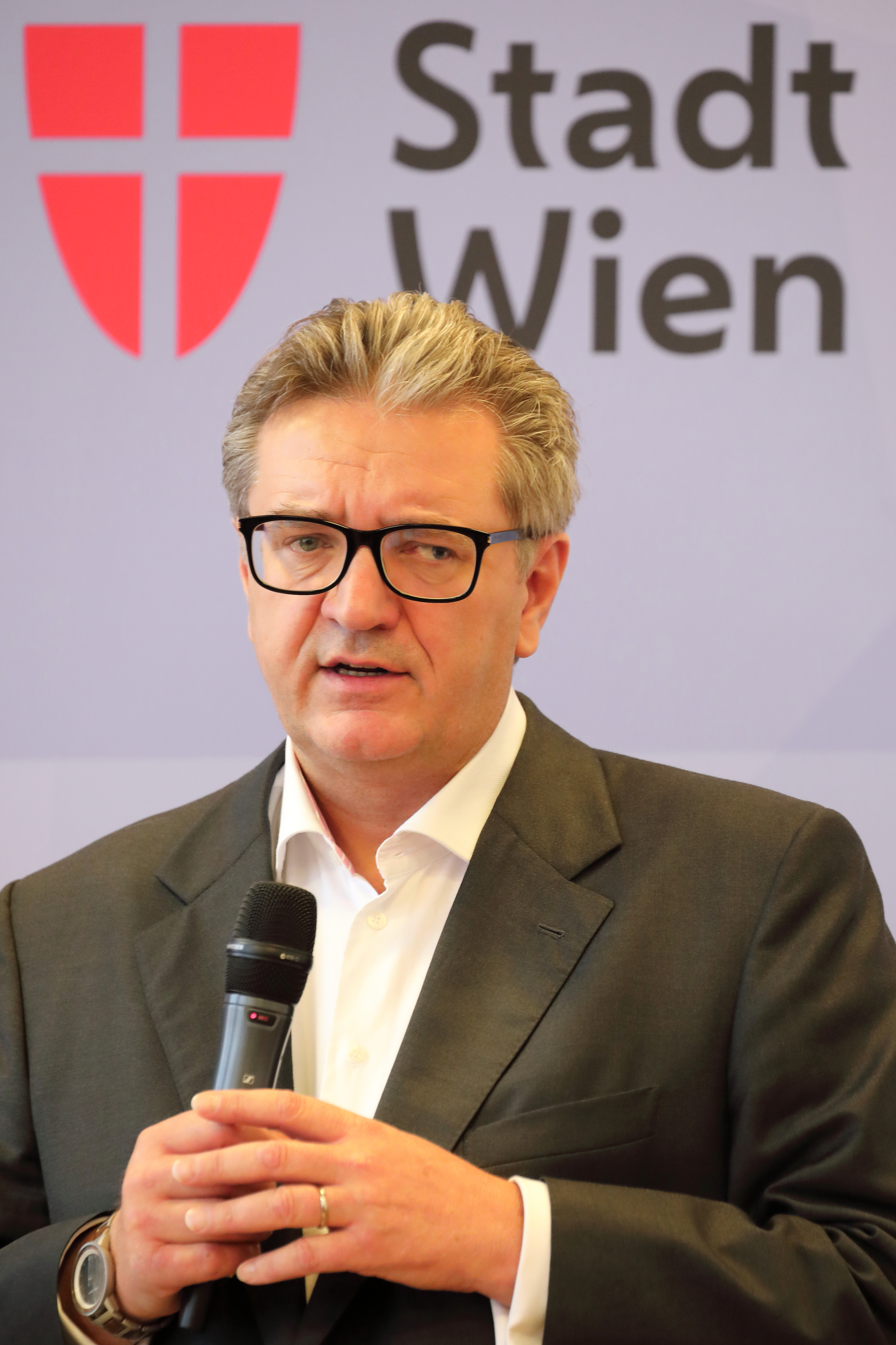 Der österreichische SPÖ-Politiker und Wiener Stadtrat Peter Hacker bei einer Pressekonferenz am 10. März 2020 im Wiener Rathaus über die aktuelle Lage und Maßnahmen zum Corona-Virus.